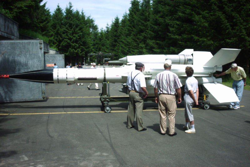 Besichtigung BL-64-Lenkwaffenstellung ZG